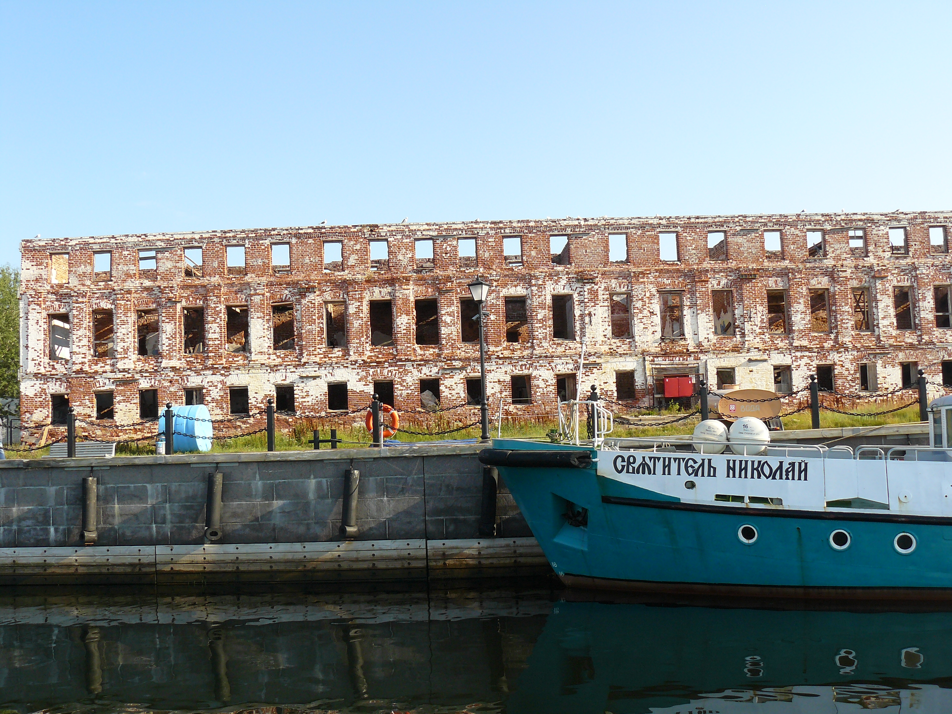 Будинок НКВС на Соловках